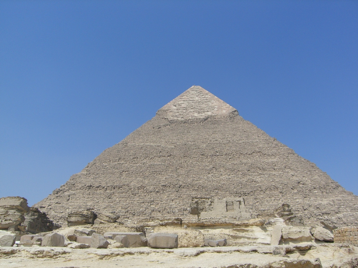 Vue des ruines du temple haut ou temple funéraire et de la pyramide de Khéphren à Gizeh - IVe dynastie égyptienne